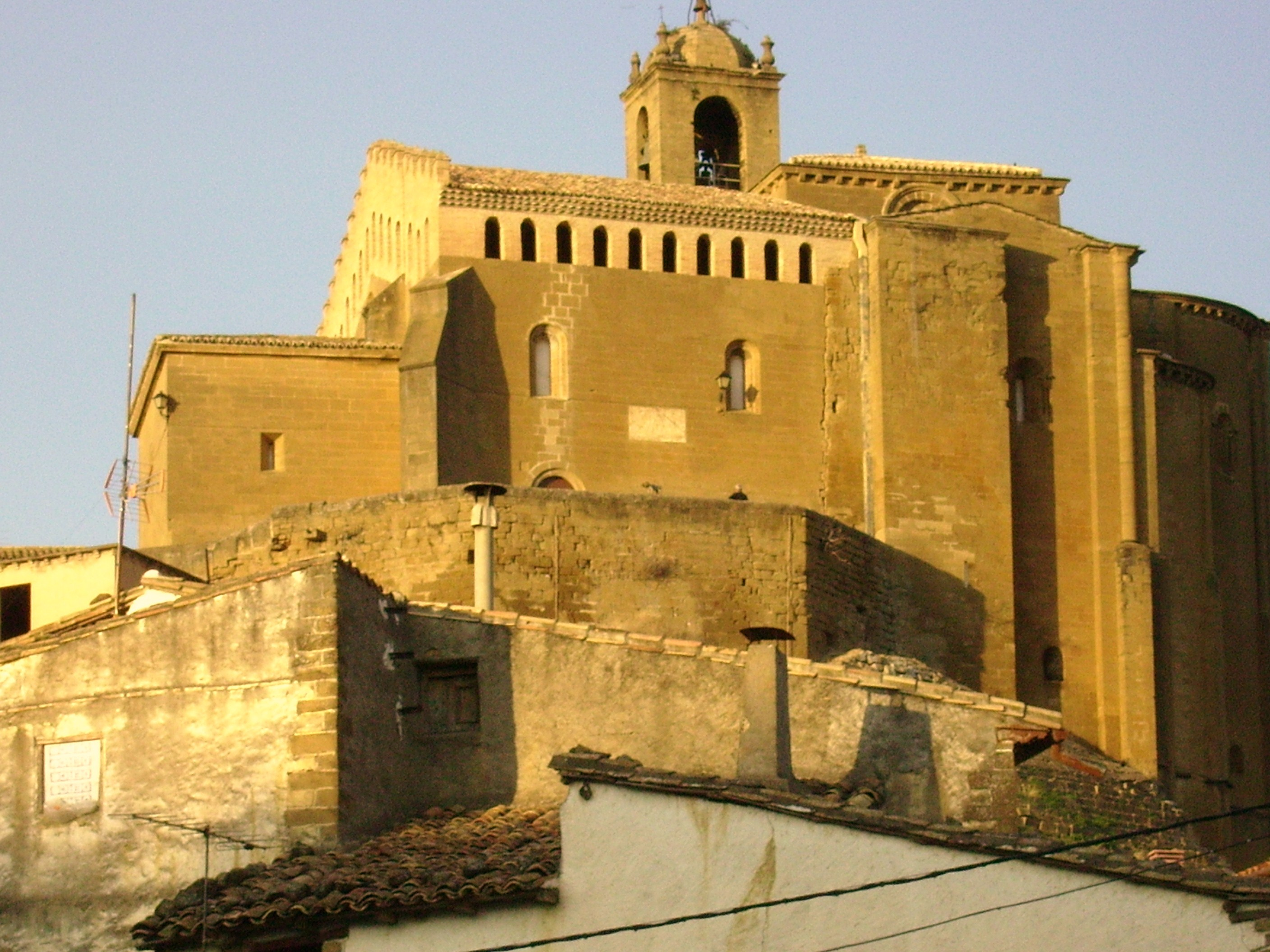 Iglesia de Murillo de Gállego